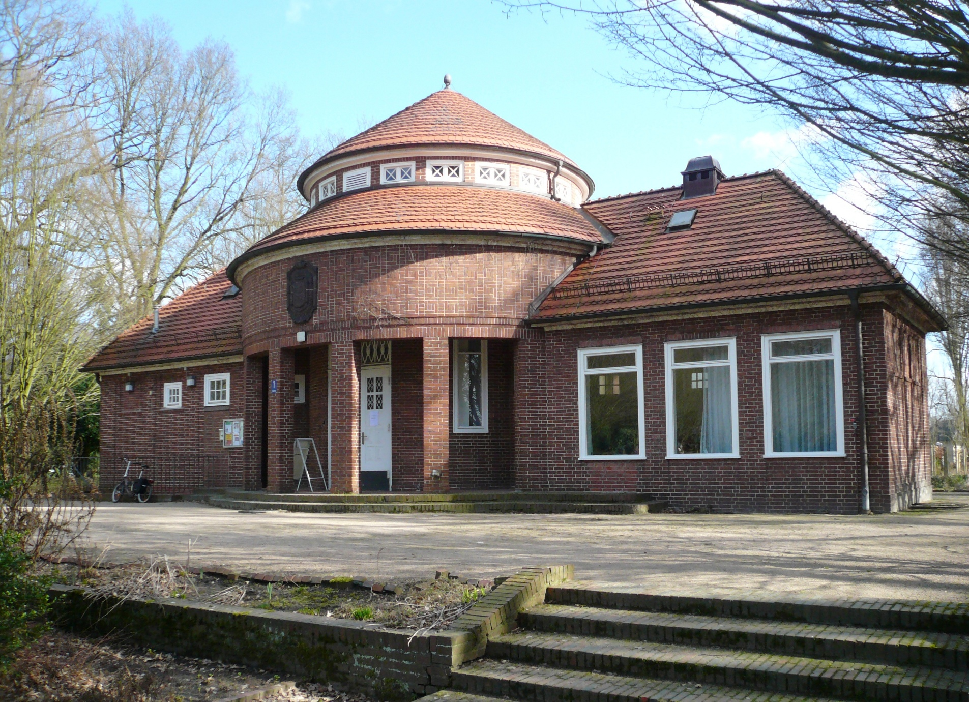 Trinkhalle im Stadtpark, Hamburg. Architekt: Fritz Schumacher, 1916